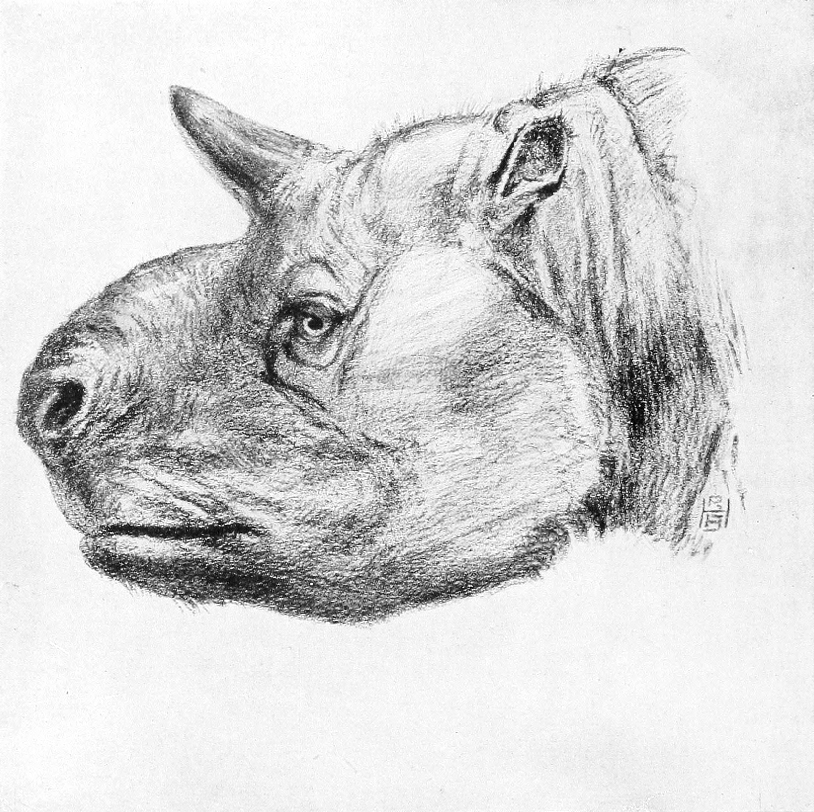 Trigodon gaudryi